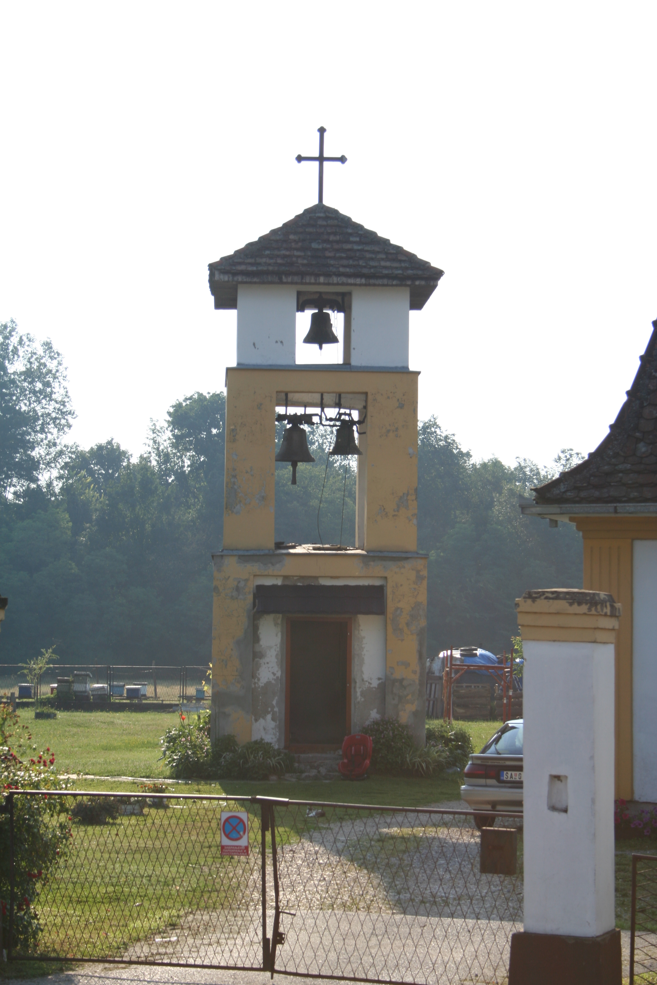 Crkva Svetog Marka, Varna